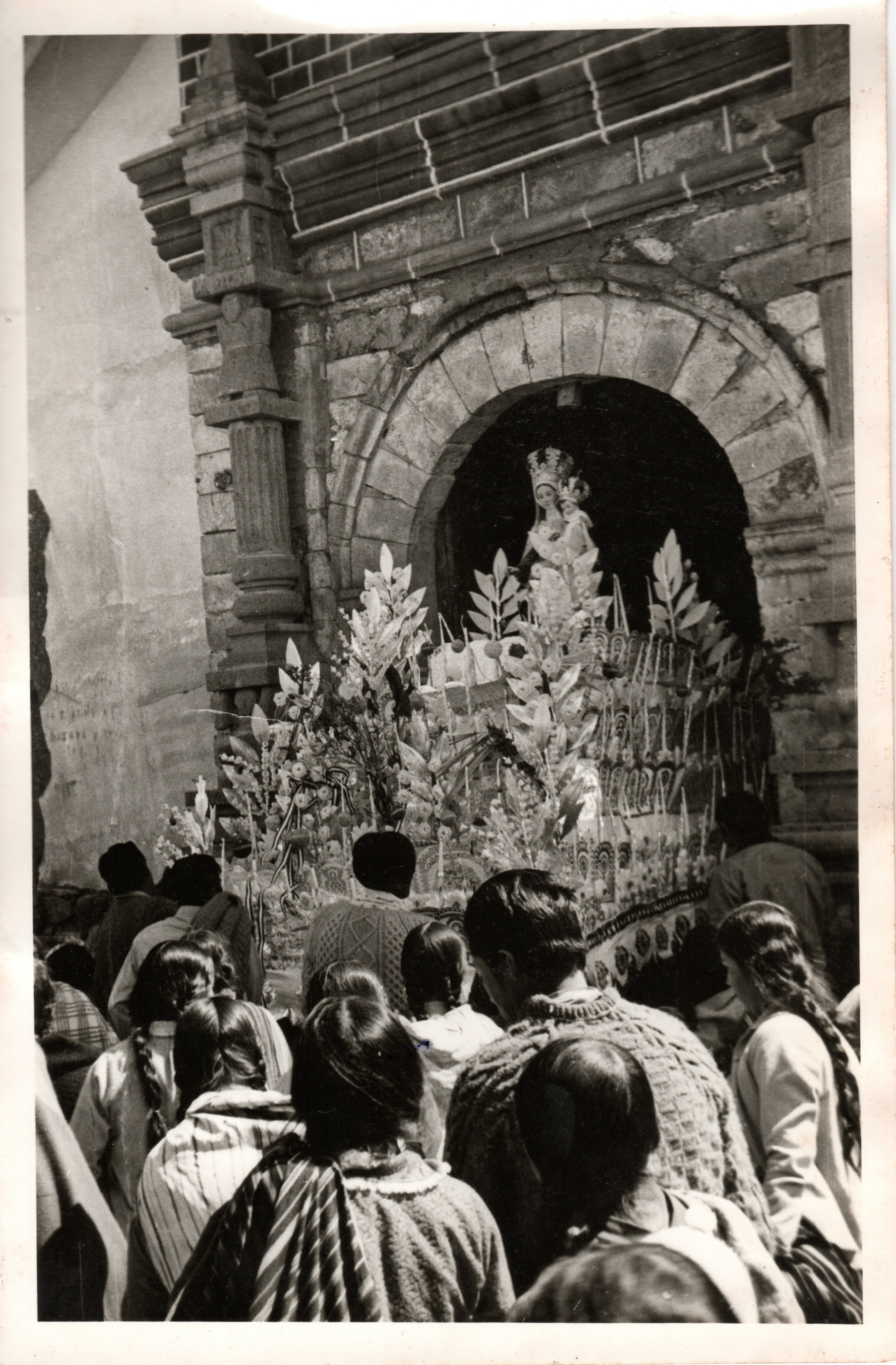 Salida de la procesión por las puertas del templo San Juan Bautista. Los devotos acuden a orar y acompañar a la virgen del carmen